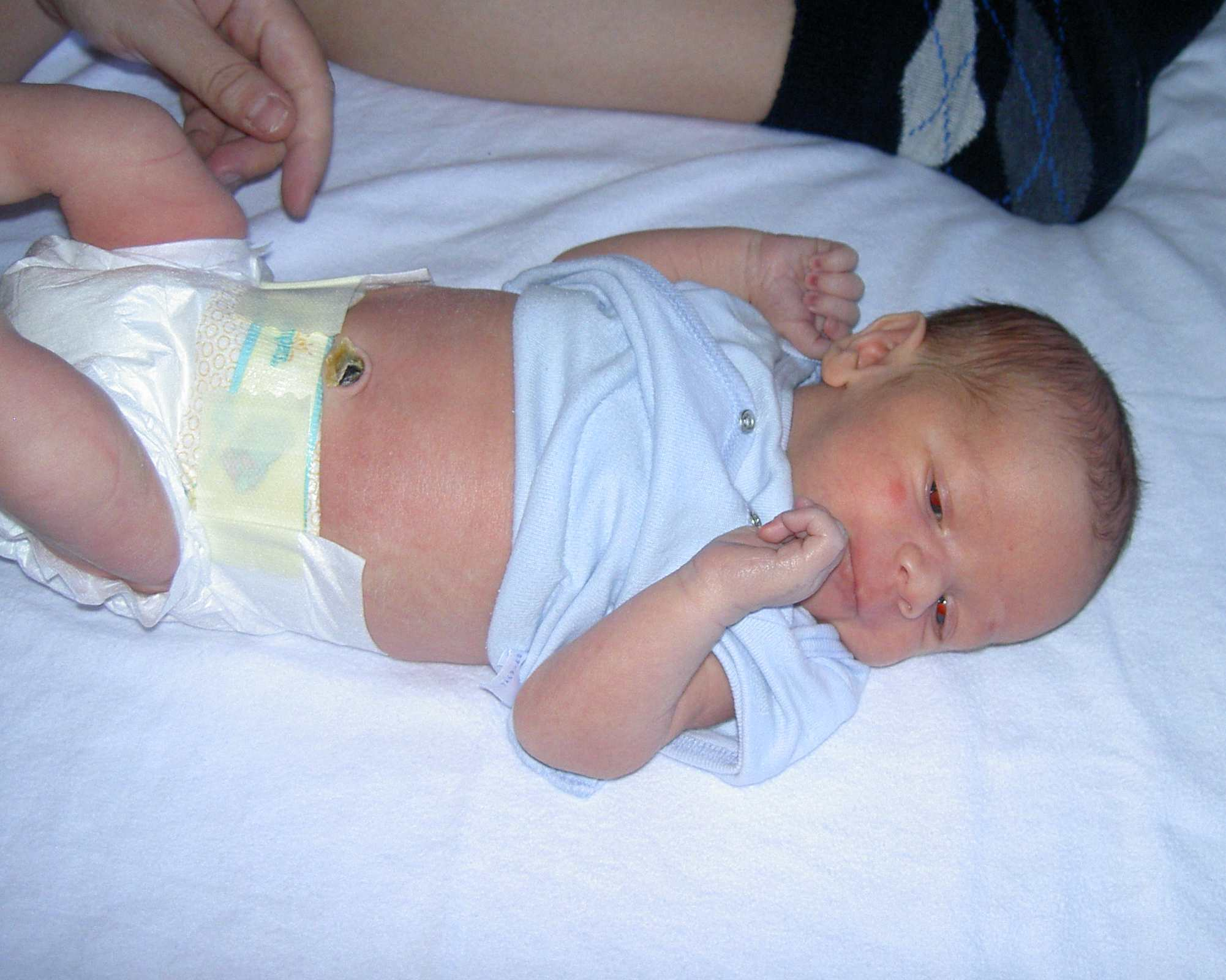 11 Tage altes Kind